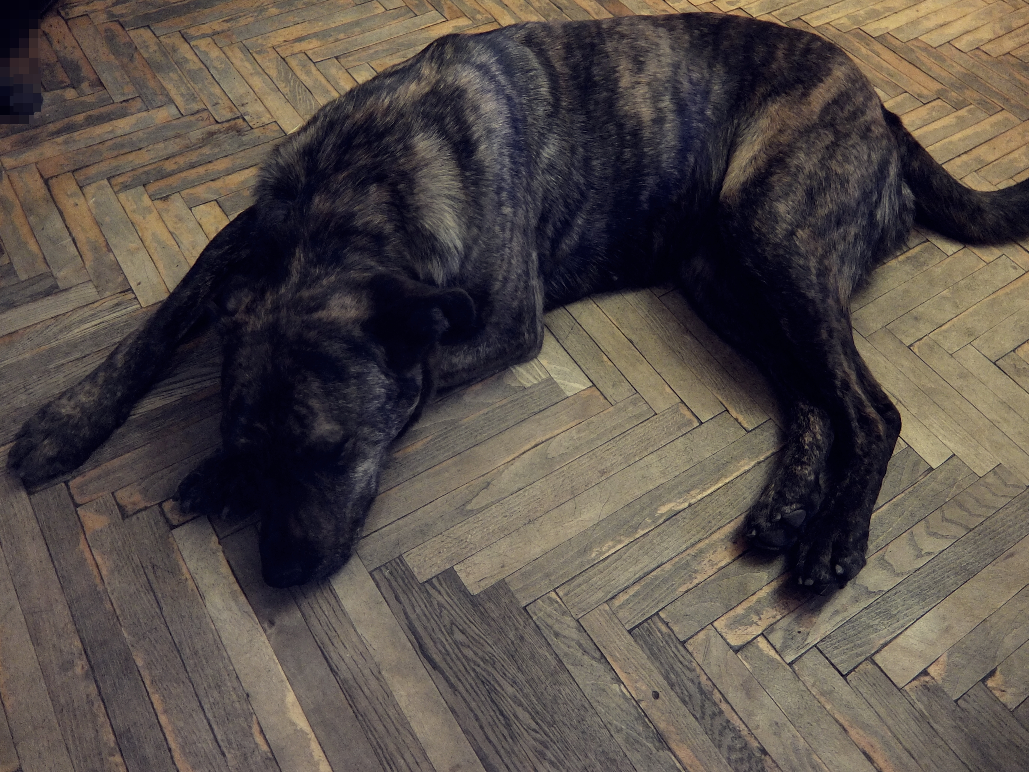 Line's Blashko